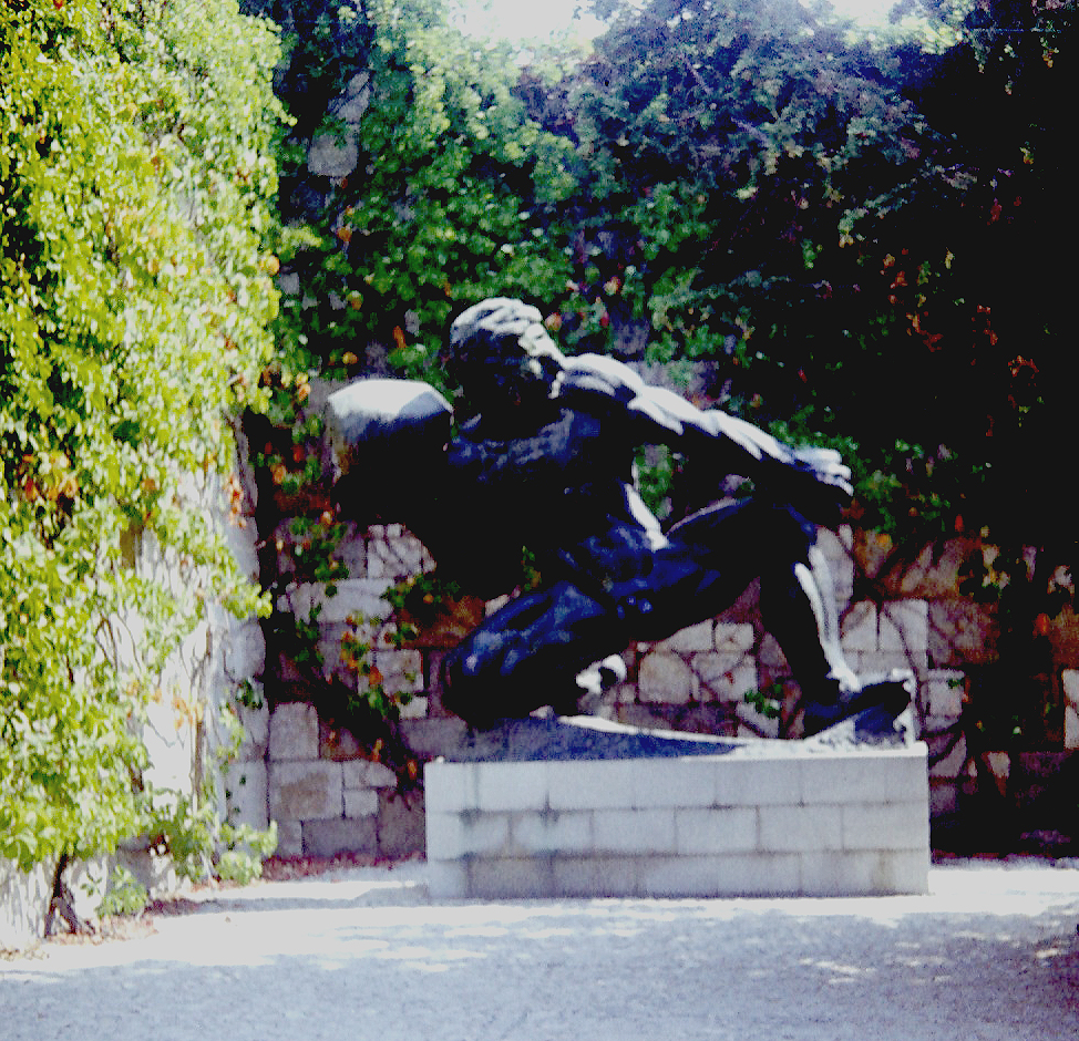 Bronzszobor a Meštrović-galéria kertjében (Split)